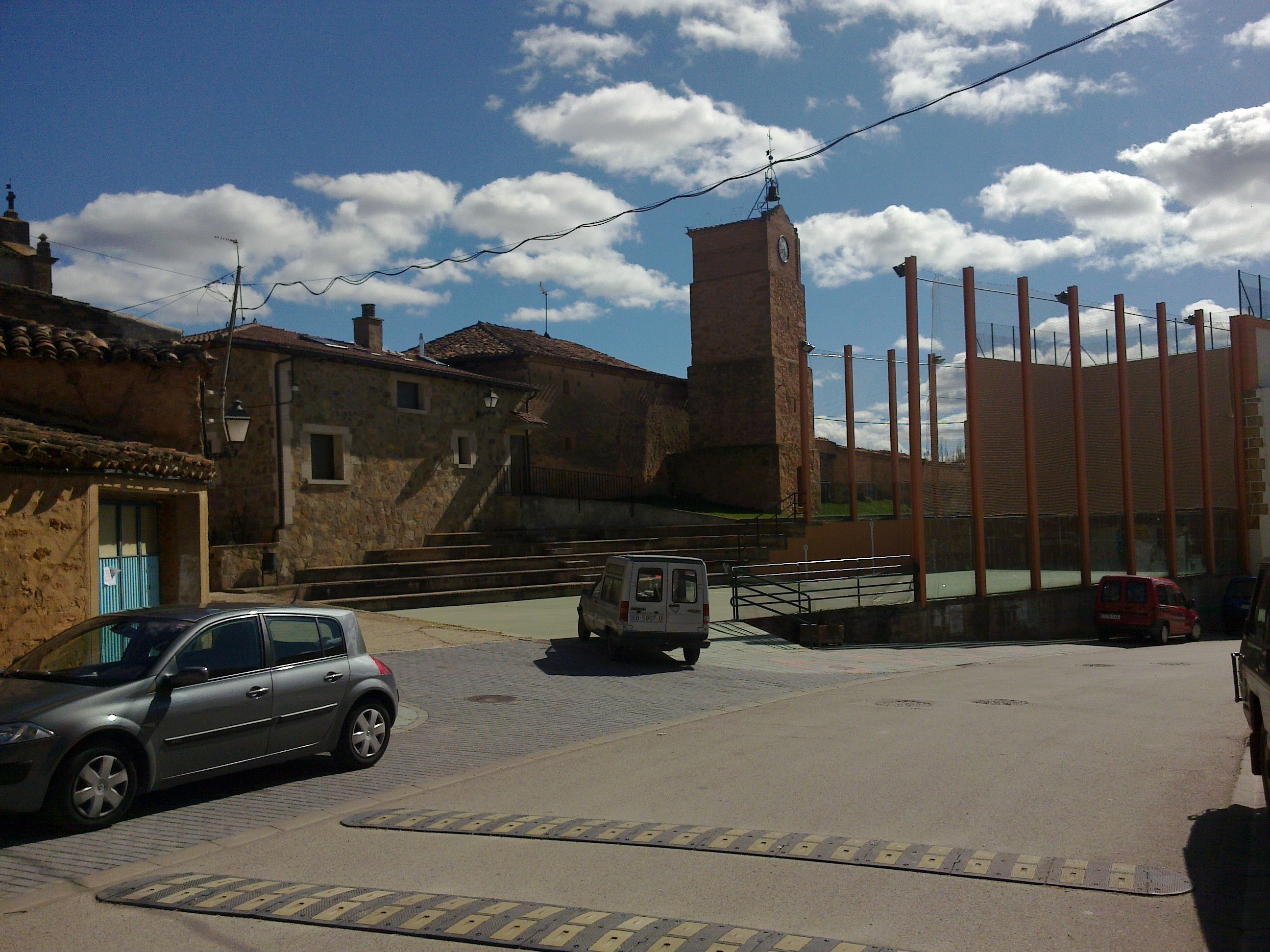 Erdigunea.